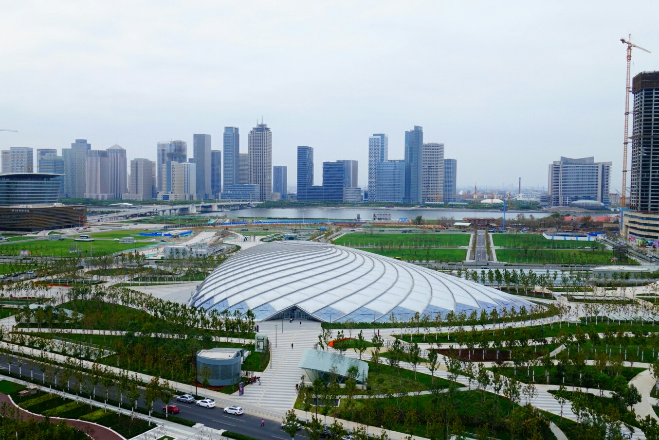 中文（中国大陆）: 于家堡高铁站, 地面站房的大跨度网壳穹顶